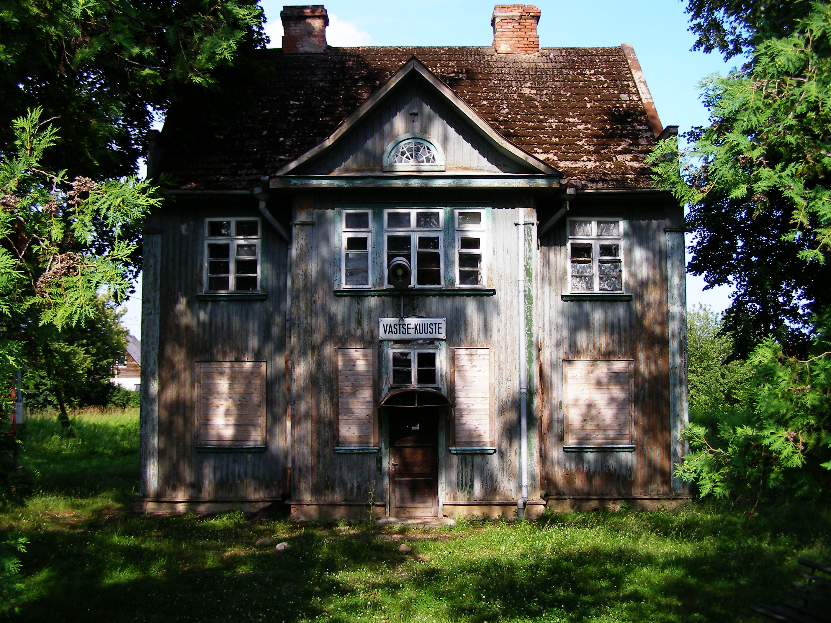 Vastse-Kuuste raudteejaama endine hoone